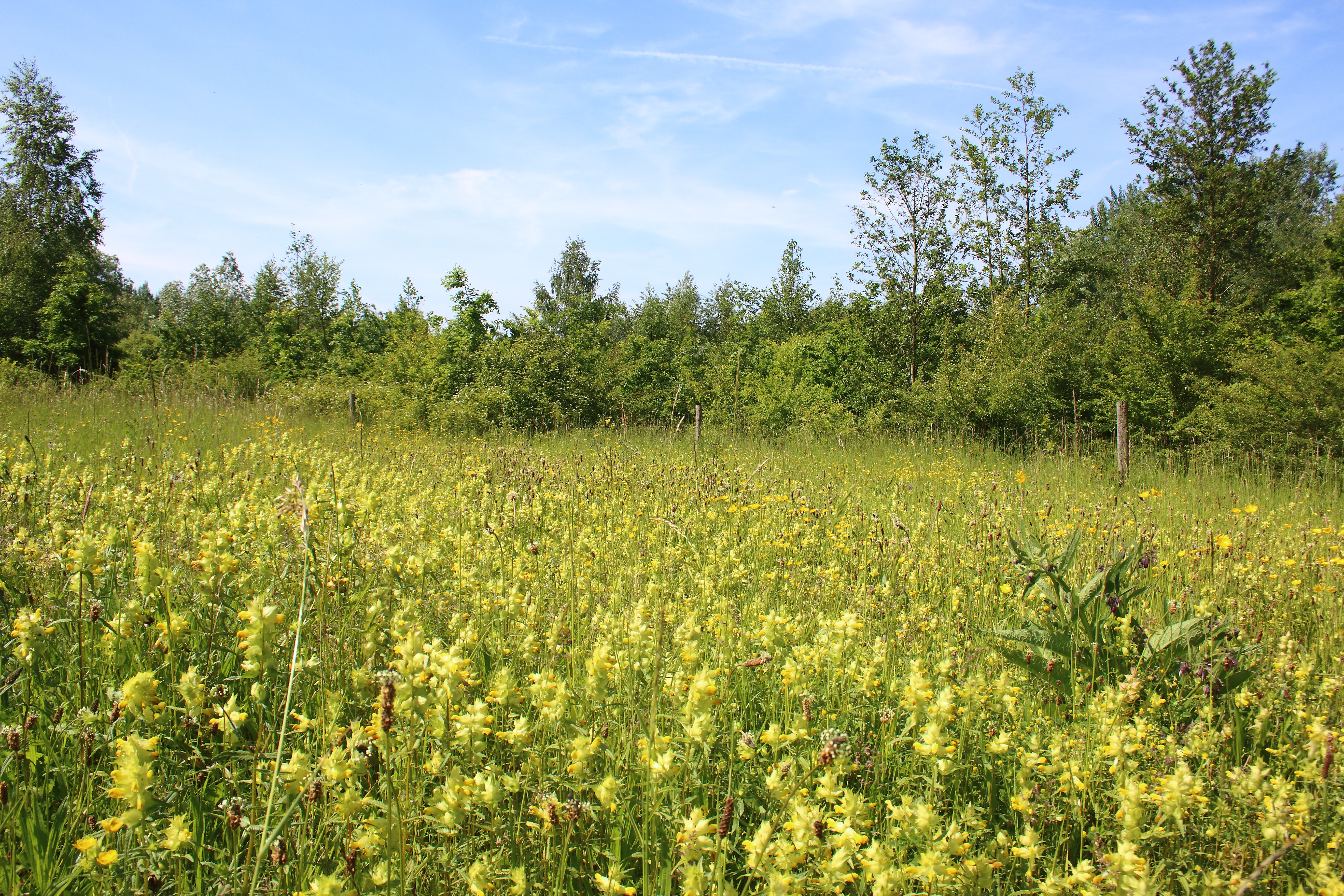 Volkegembos, Oudenaarde, Vlaanderen, België